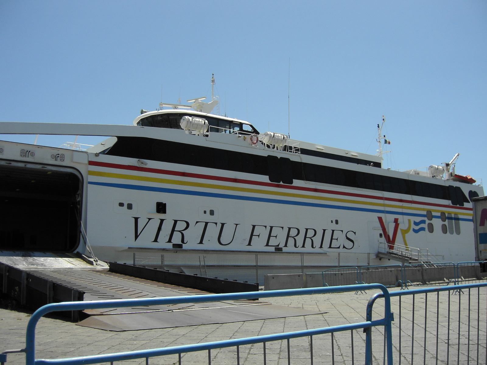 VIRTU FERRIES - Catania